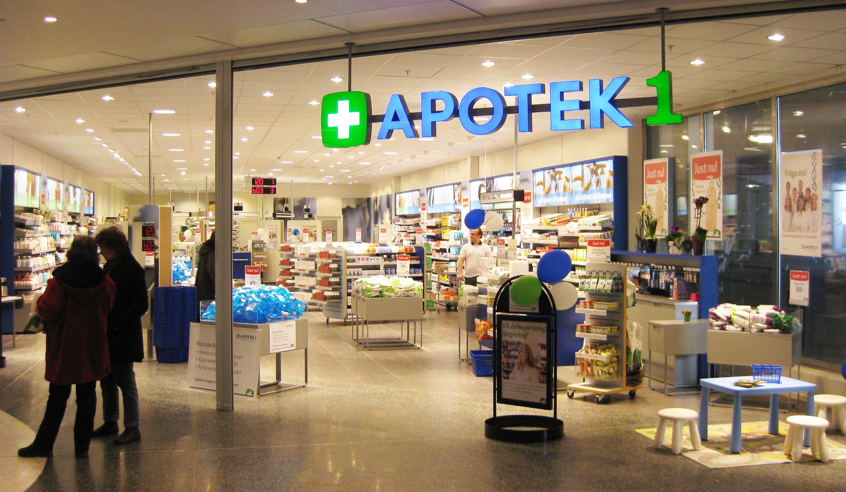 Apotek 1, några dagar efter öppnandet i Frölunda Torg, Göteborg, Sverige.